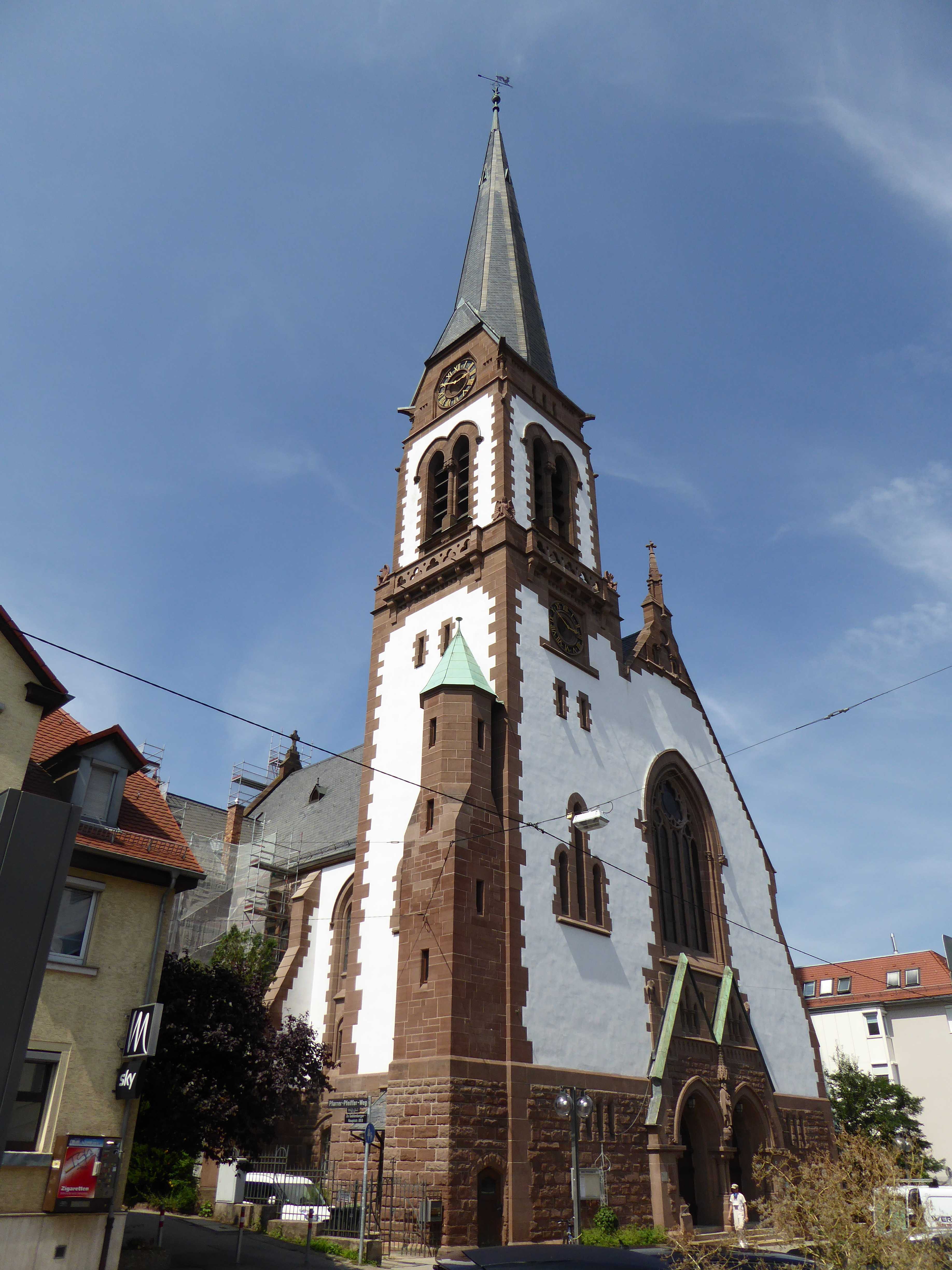 evang. Petruskirche, Stuttgart-Gablenberg (renoviert 2017)